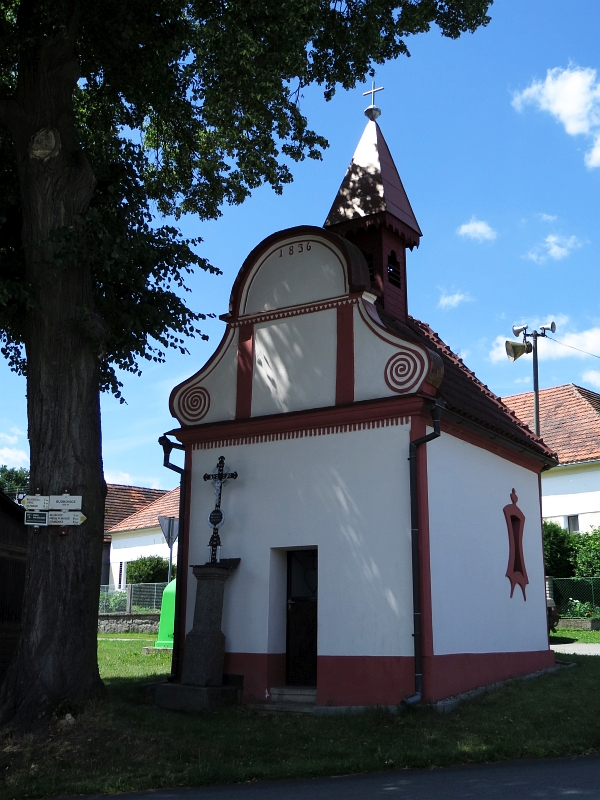 Kaple svatého Václava, Sudkovice.